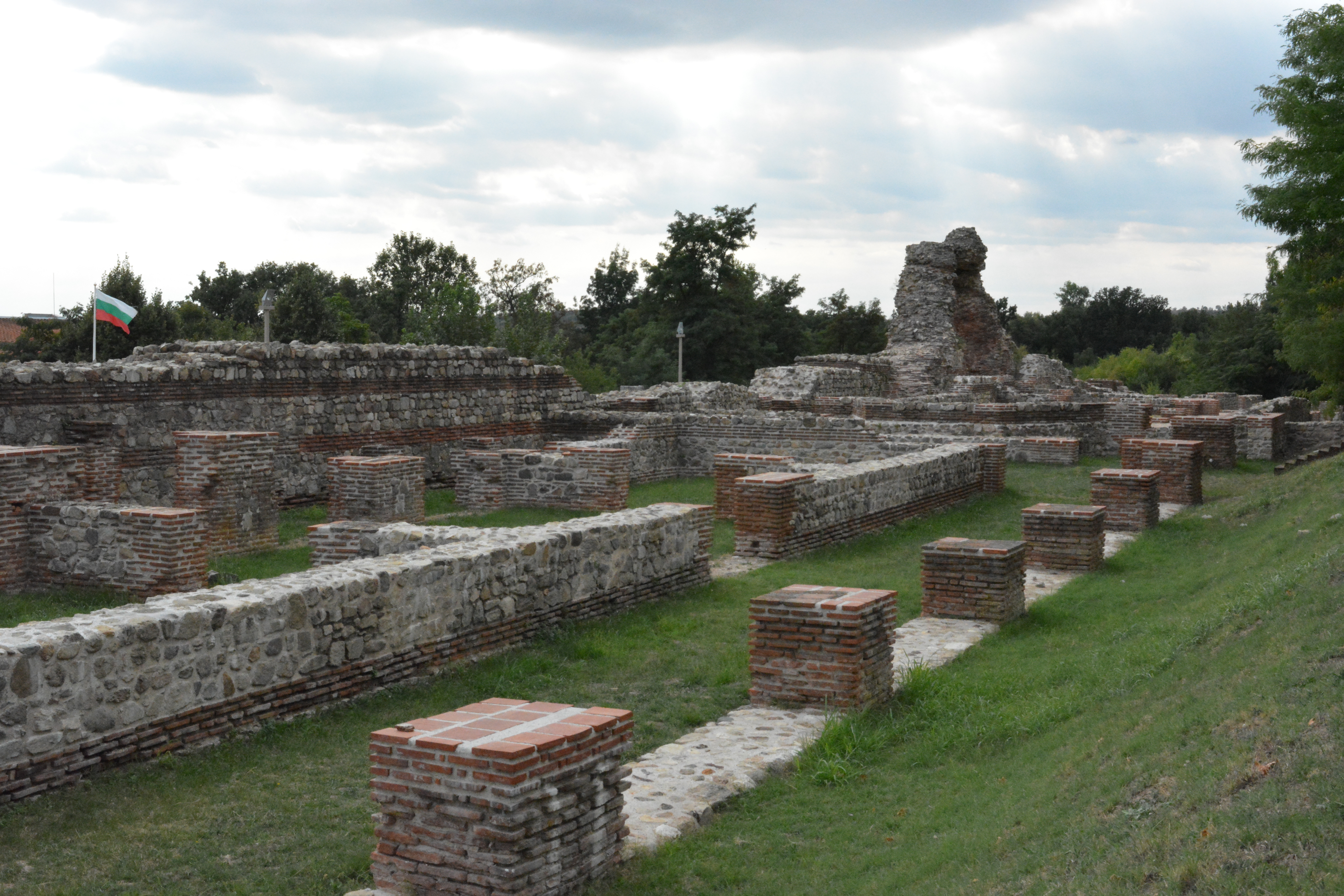 Хисарска крепост